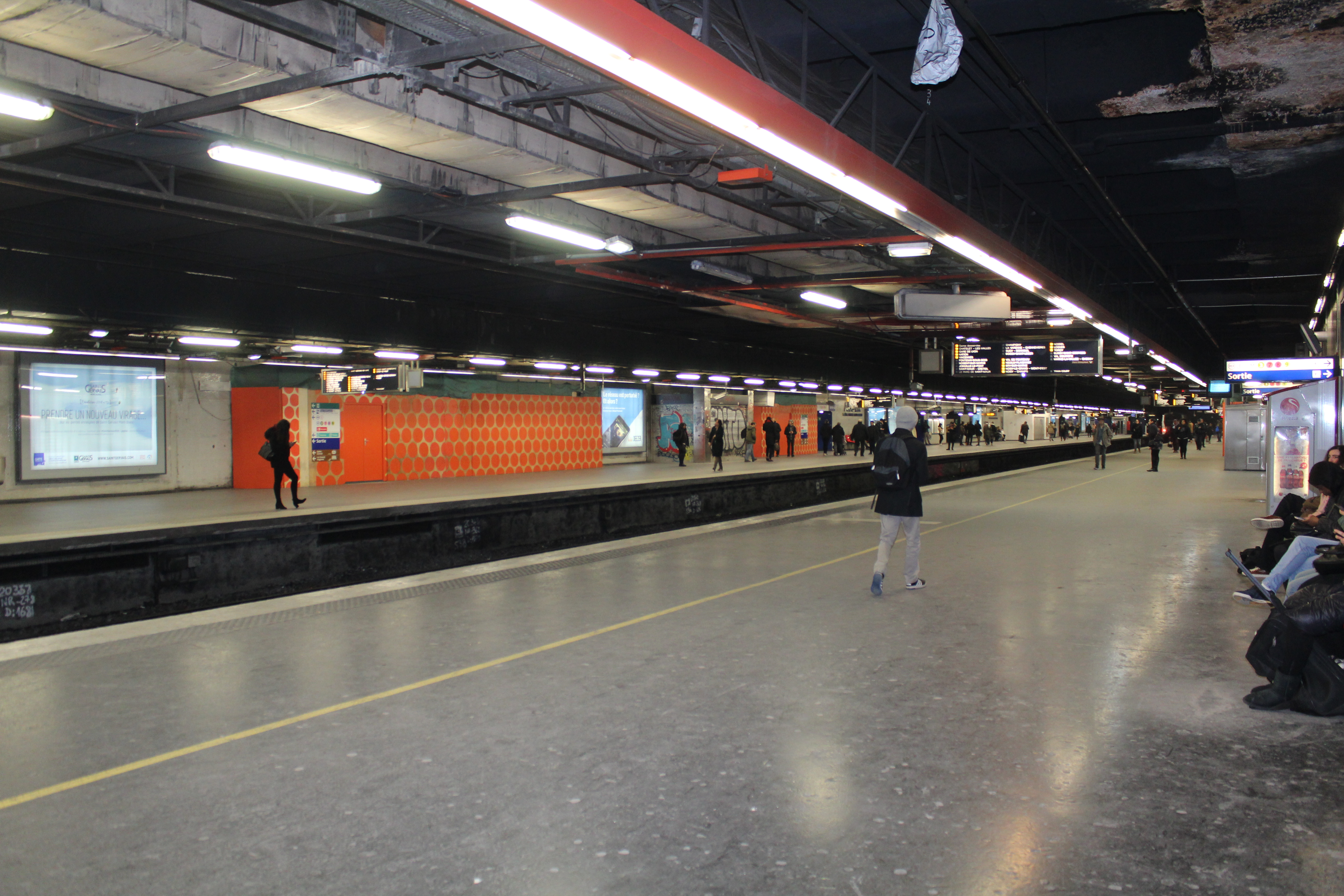 Gare d'Auber, Paris.